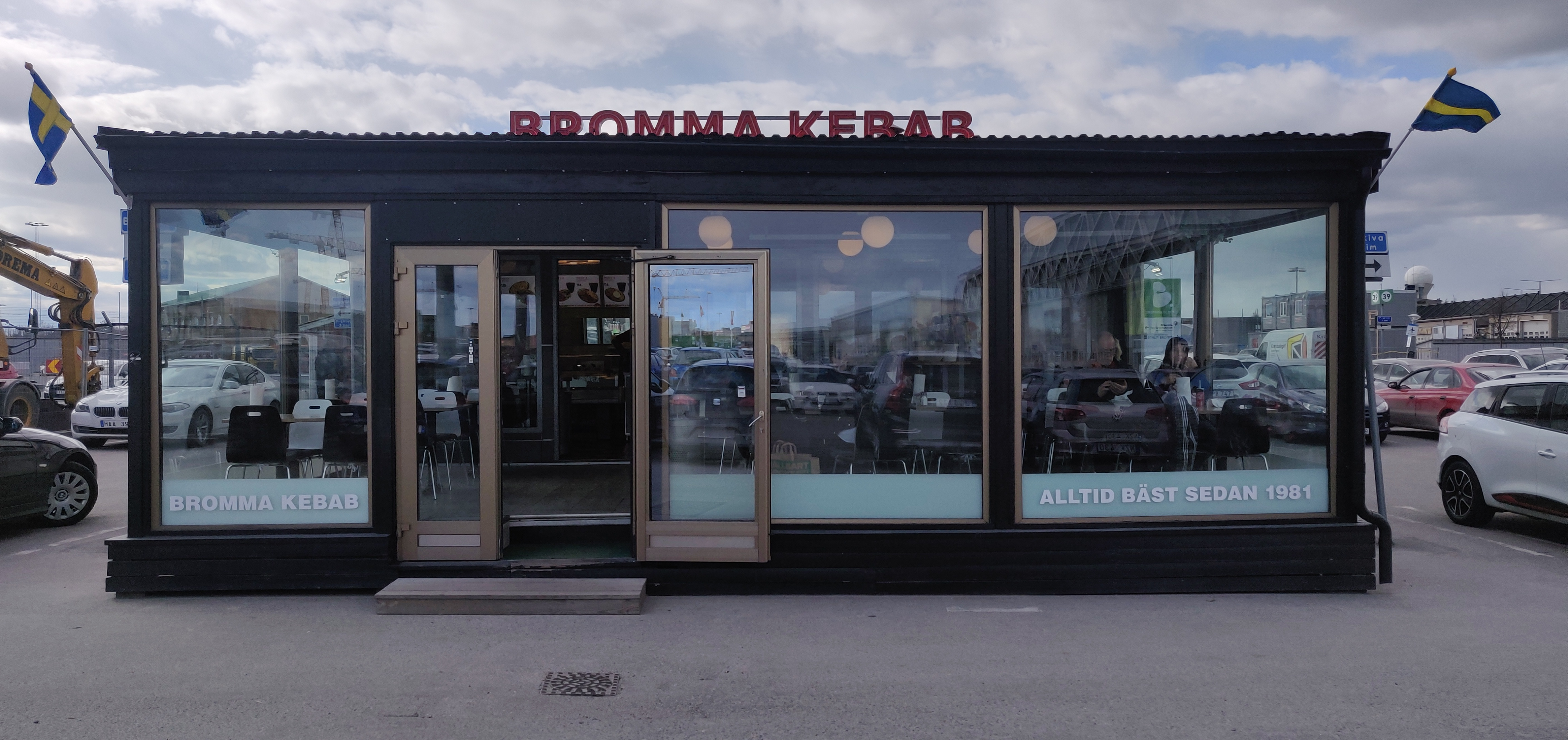 Bromma Kebab var en av de första kebabresturangerna i Stockholm.